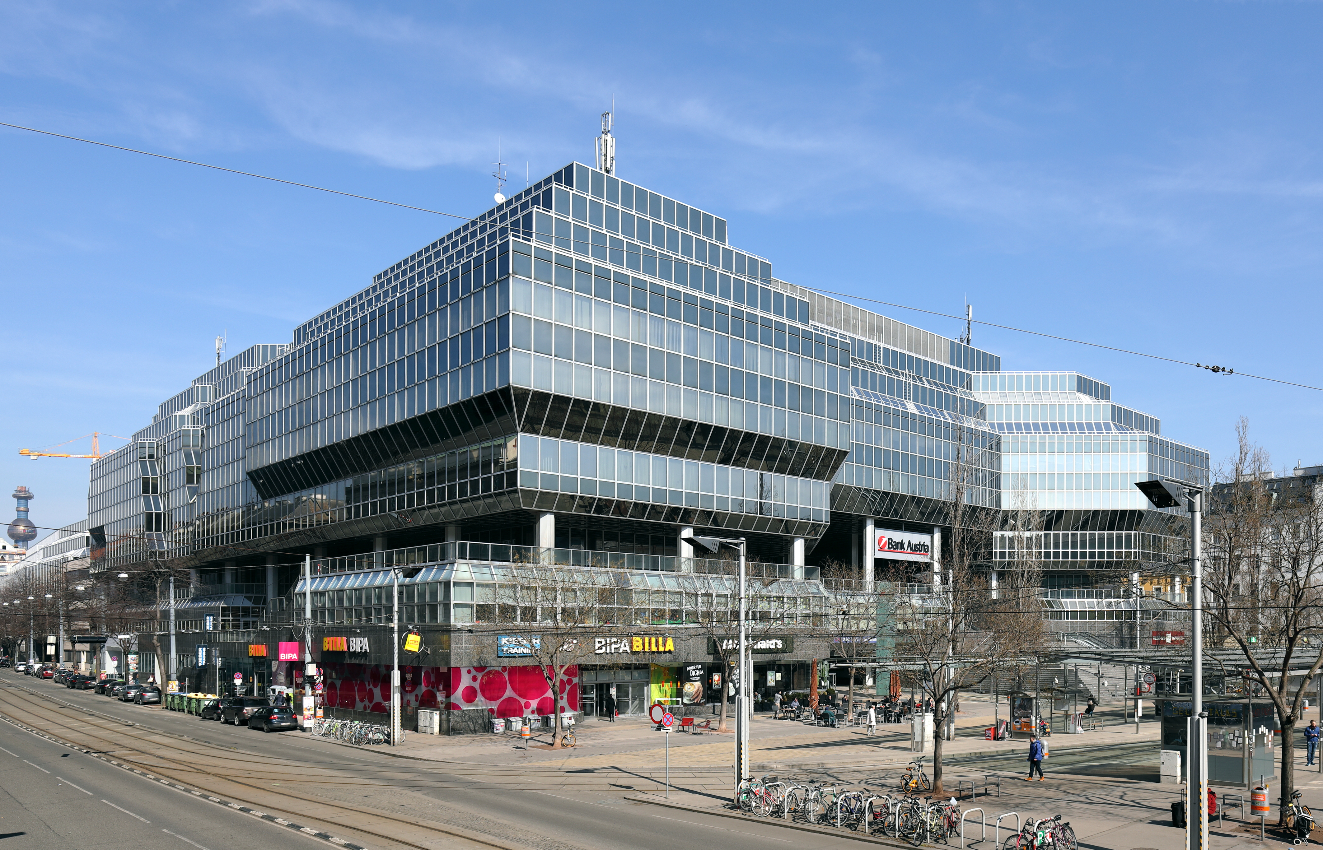 Die Überbauung, ein Handels- und Dienstleistungbaukomplex, des Franz-Josefs-Bahnhofes im Bereich Julius-Tandler-Platz//Althanstraße im 9. Wiener Gemeindebezirk Alsergrund. Ab Ende 1974 wurde der alte Bahnhof (1872 eröffnet und mehrfach umgebaut) abgerissen und anschließend die Überbauung nach einem Konzept der Architekten Kurt Hlaweniczka und Karl Schwanzer bis 1982 realisiert, wobei der Bahnhof selbst 1978 fertiggestellt war. Es war Wiens erster Bahnhof neuen Typus, bei dem der Eisenbahnbetrieb nur noch Teil eines Handels- und Dienstleistungskomplexes ist.